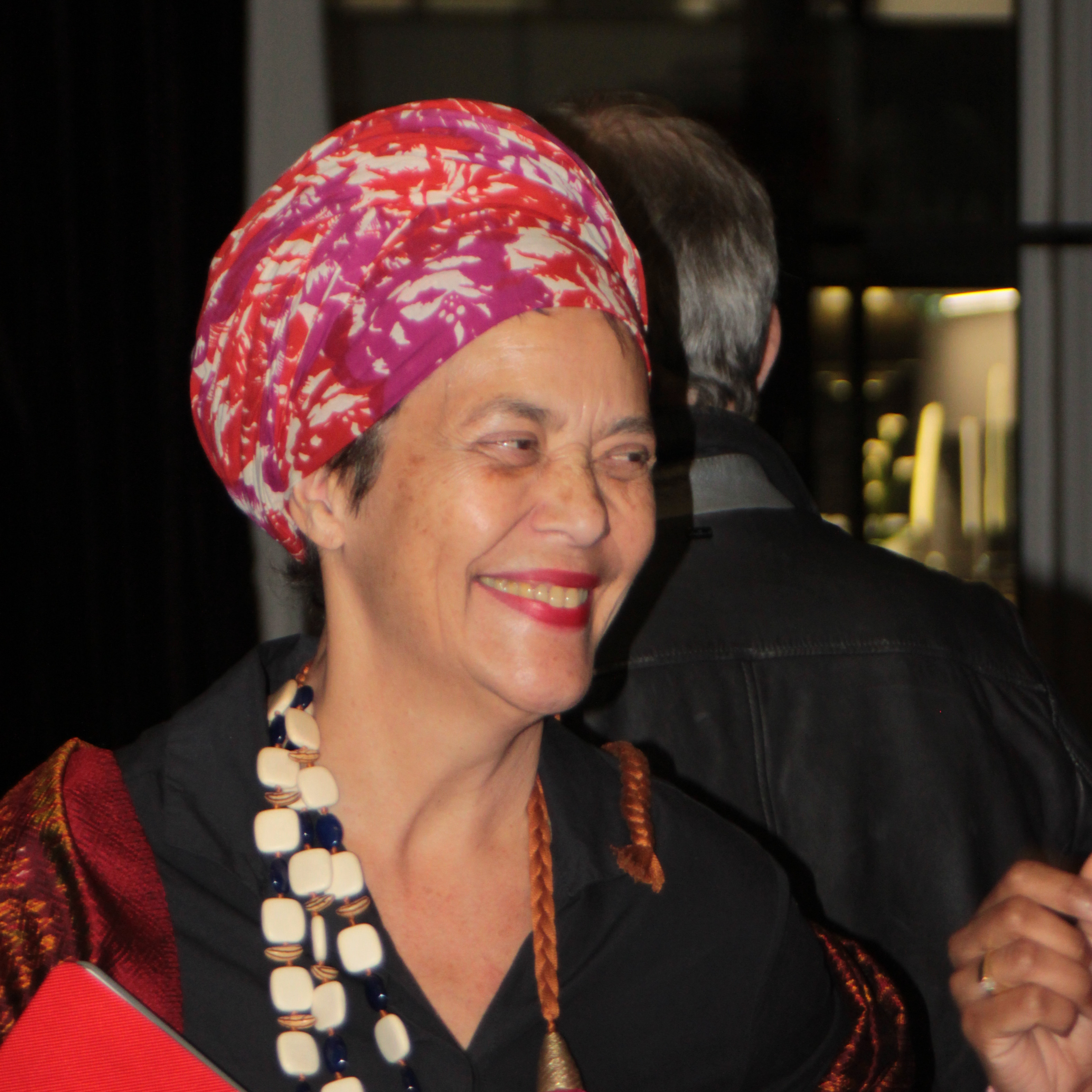 Françoise Vergès à une table-ronde sur la "Traite, esclavage et racisme : quelles conséquences aujourd'hui ? Quels combats ?", à l'ENSAN (École Nationale Supérieure d'Architecture de Nantes), lors de la 11e journée nationale des mémoires de la traite, de l'esclavage et de leurs abolitions, le 9 mai 2016.